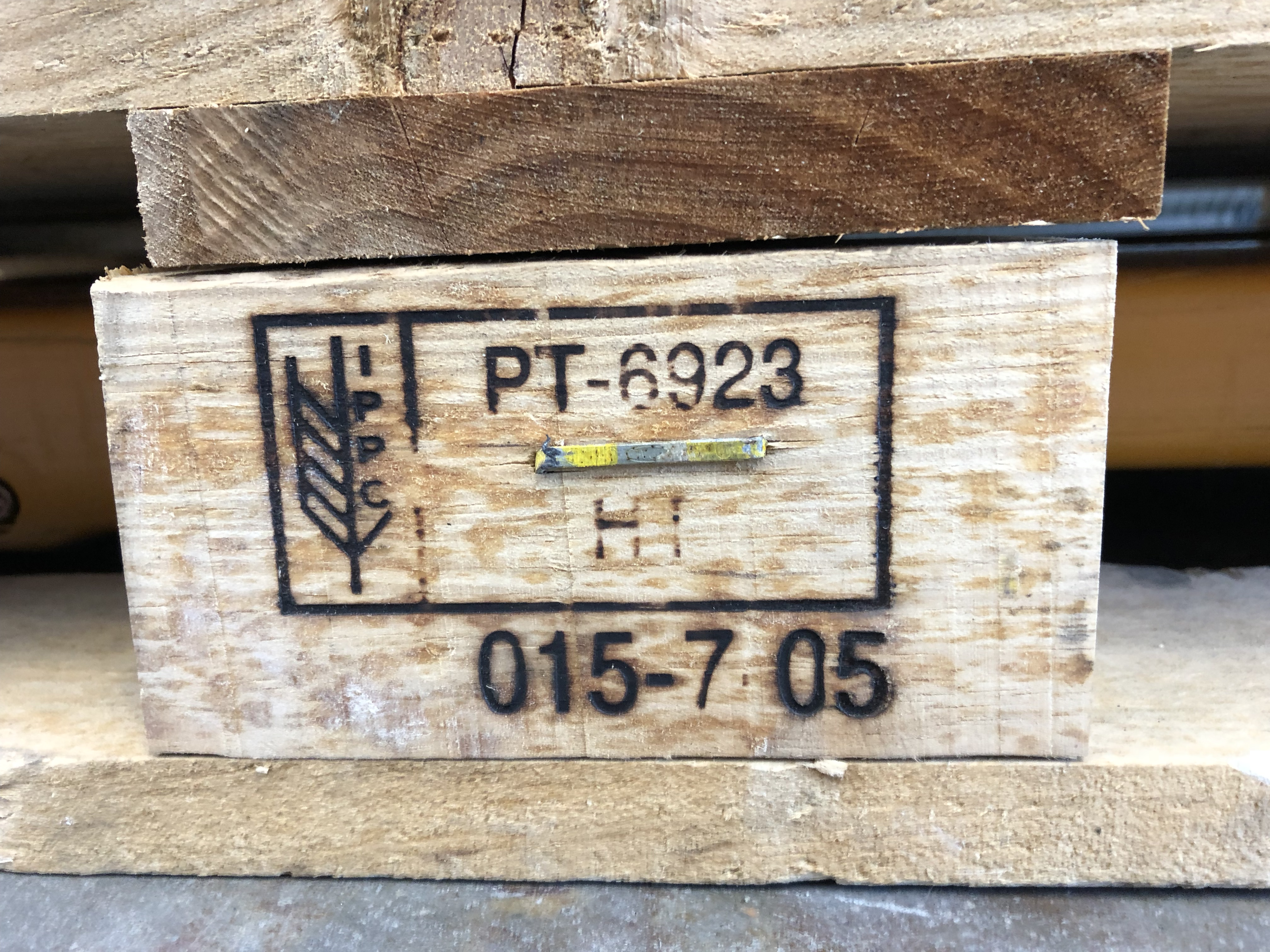 Europalette mit Kennzeichnung PT für Portugal